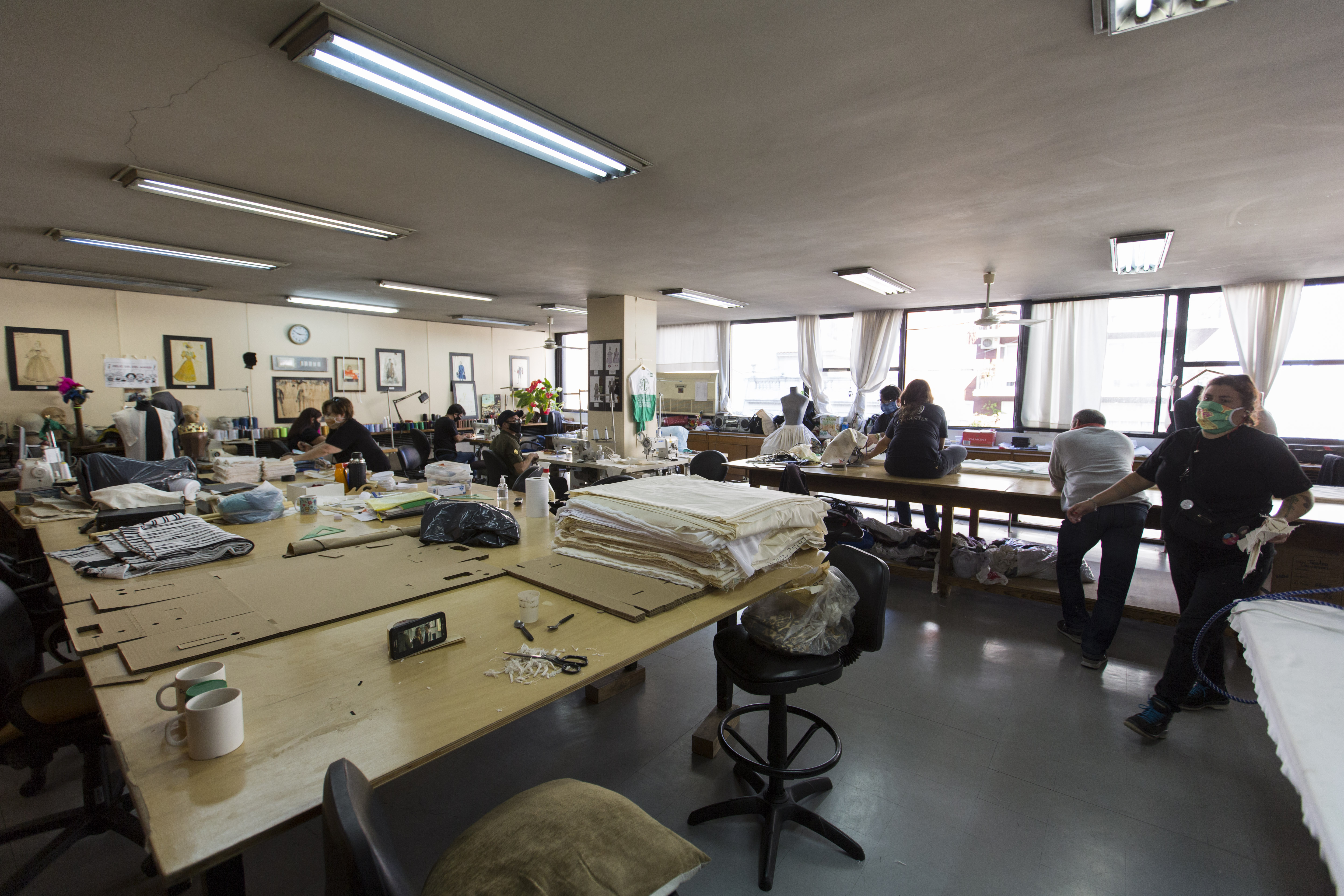 Buenos Aires, 20 de abril de 2020.- Bauer recorrió el Teatro Nacional Cervantes, donde los trabajadores de Sastrería y Vestuario confeccionan barbijos para distribuir en las zonas más necesitadas. Fotos: Augusto Starita - Ministerio de Cultura de la Nación.